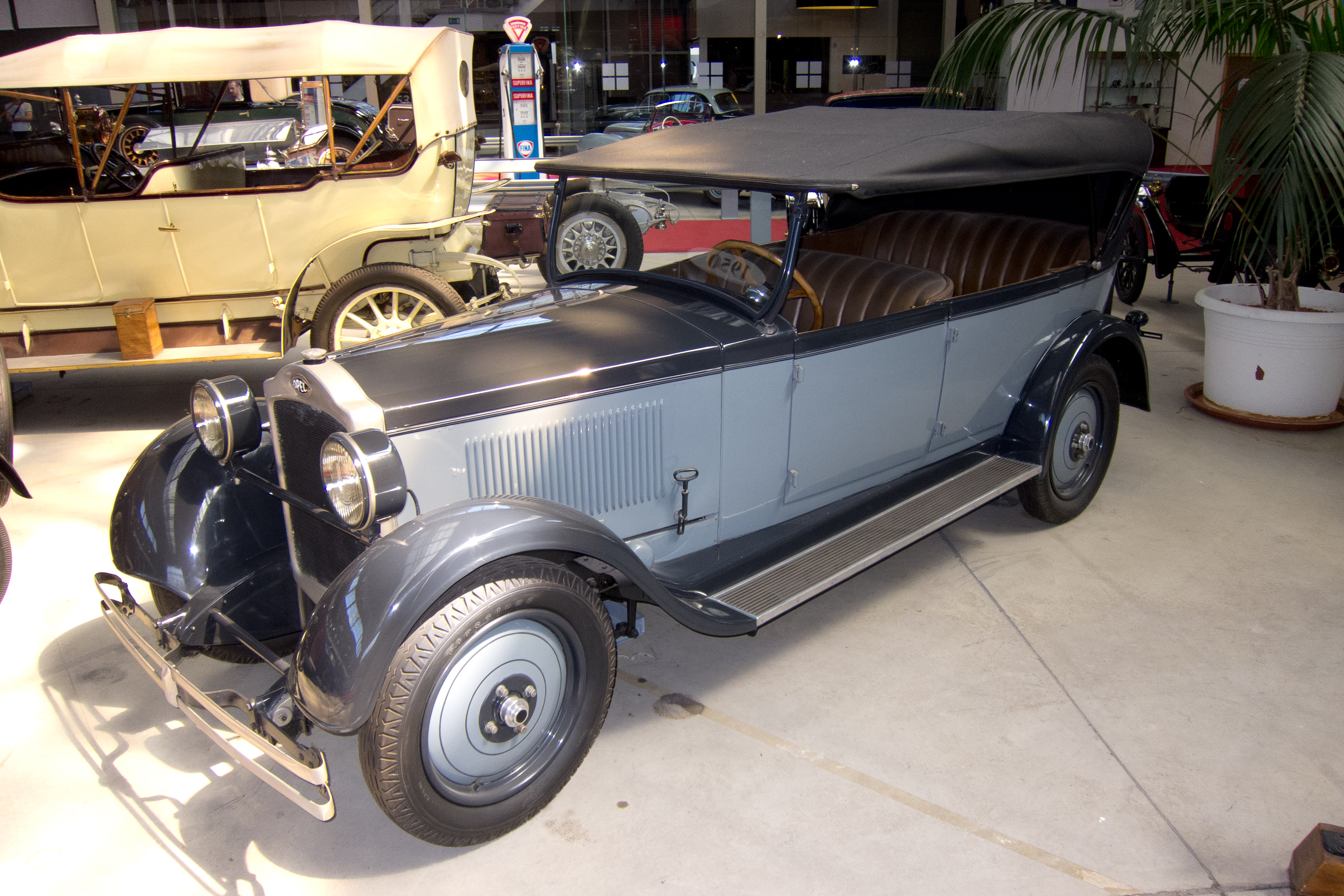 Opel 8/40 PS (1928) at Autoworld Brussels, Belgium, 2011